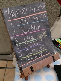 amiinaセトリボード(20150419(1))